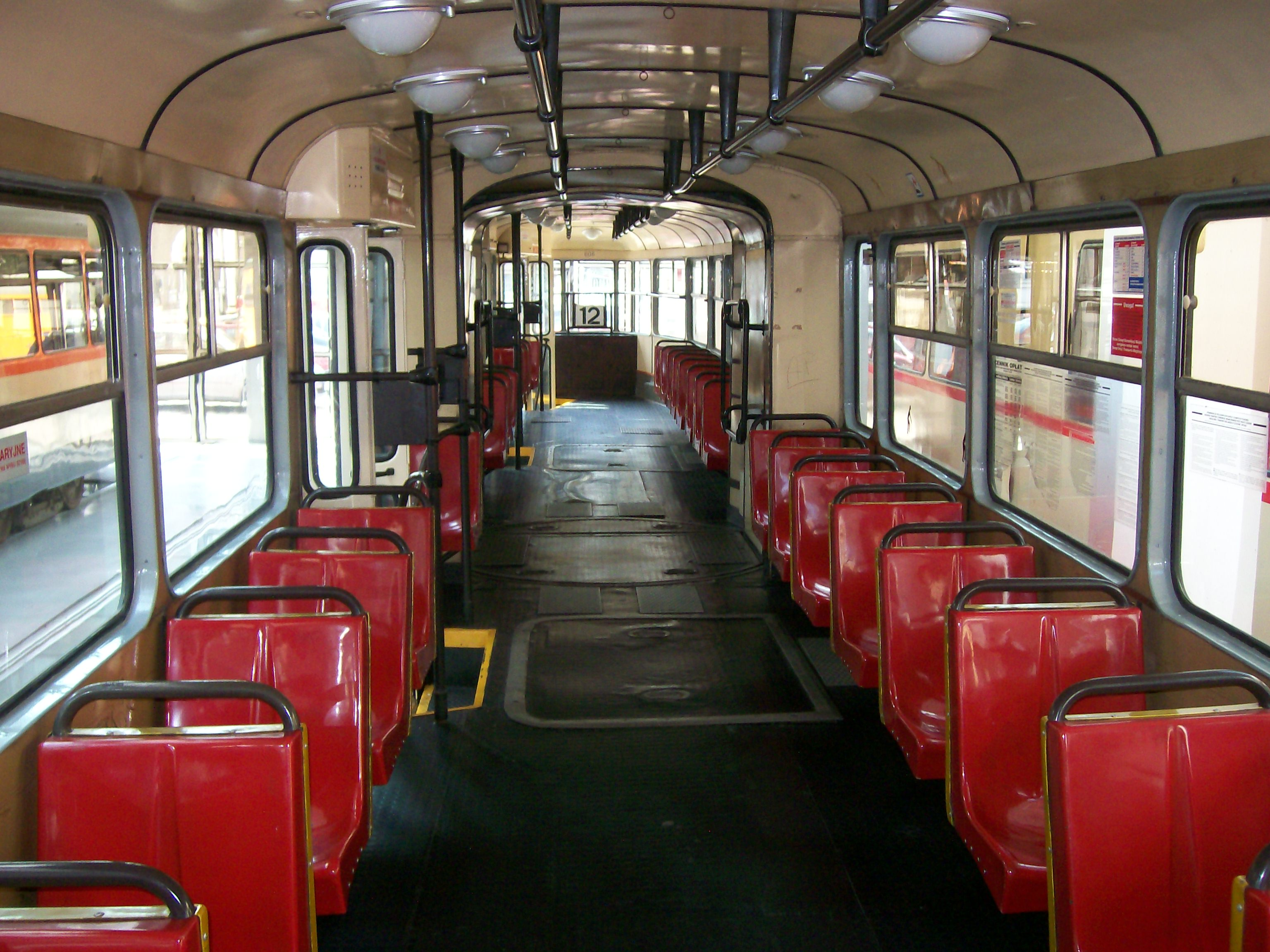 Interior of Konstal 102Na